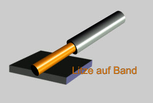 Verbindung Litze auf Band